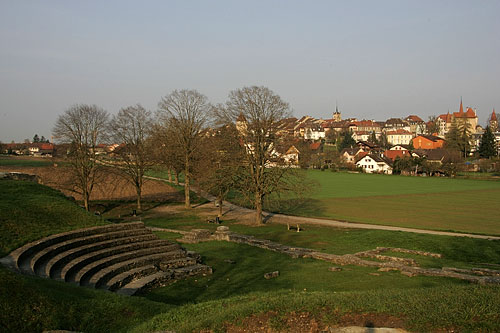 Aventicum: Théâtre